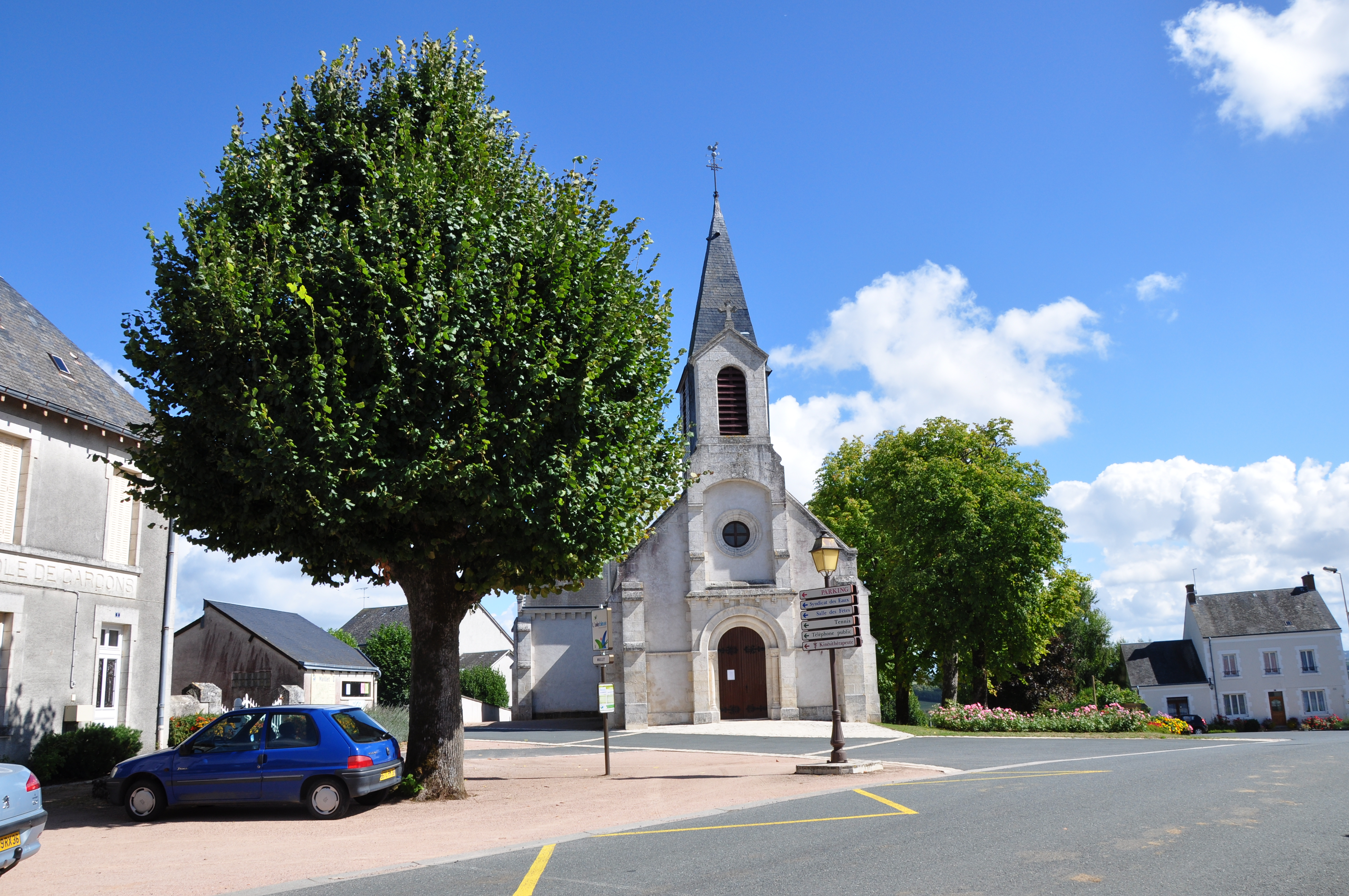 Maillet (Indre) - Place de l'église